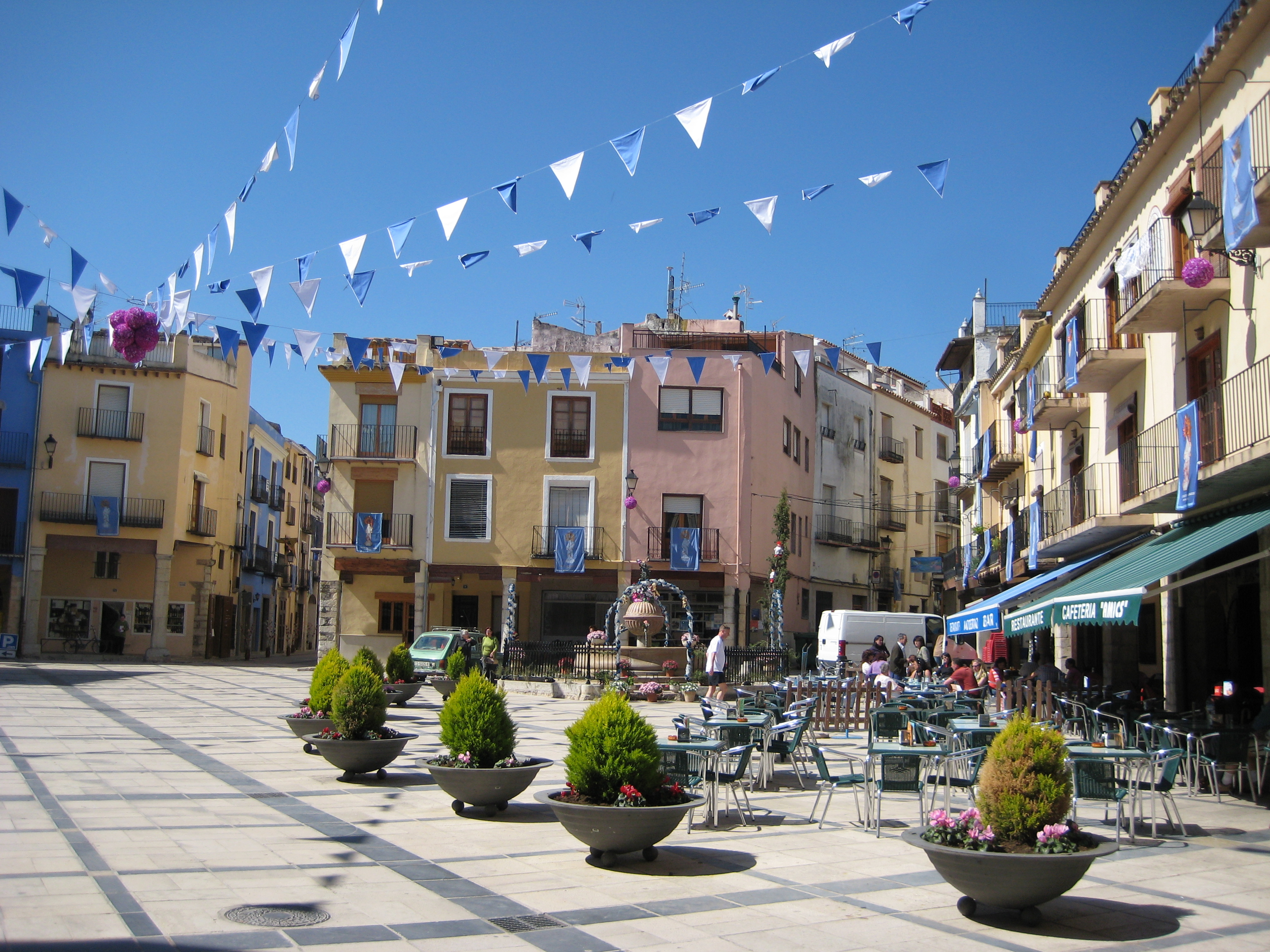 Plaça major de Sant Mateu (Plana Baixa) en plena festivitat de la Mare de Déu dels Àngels